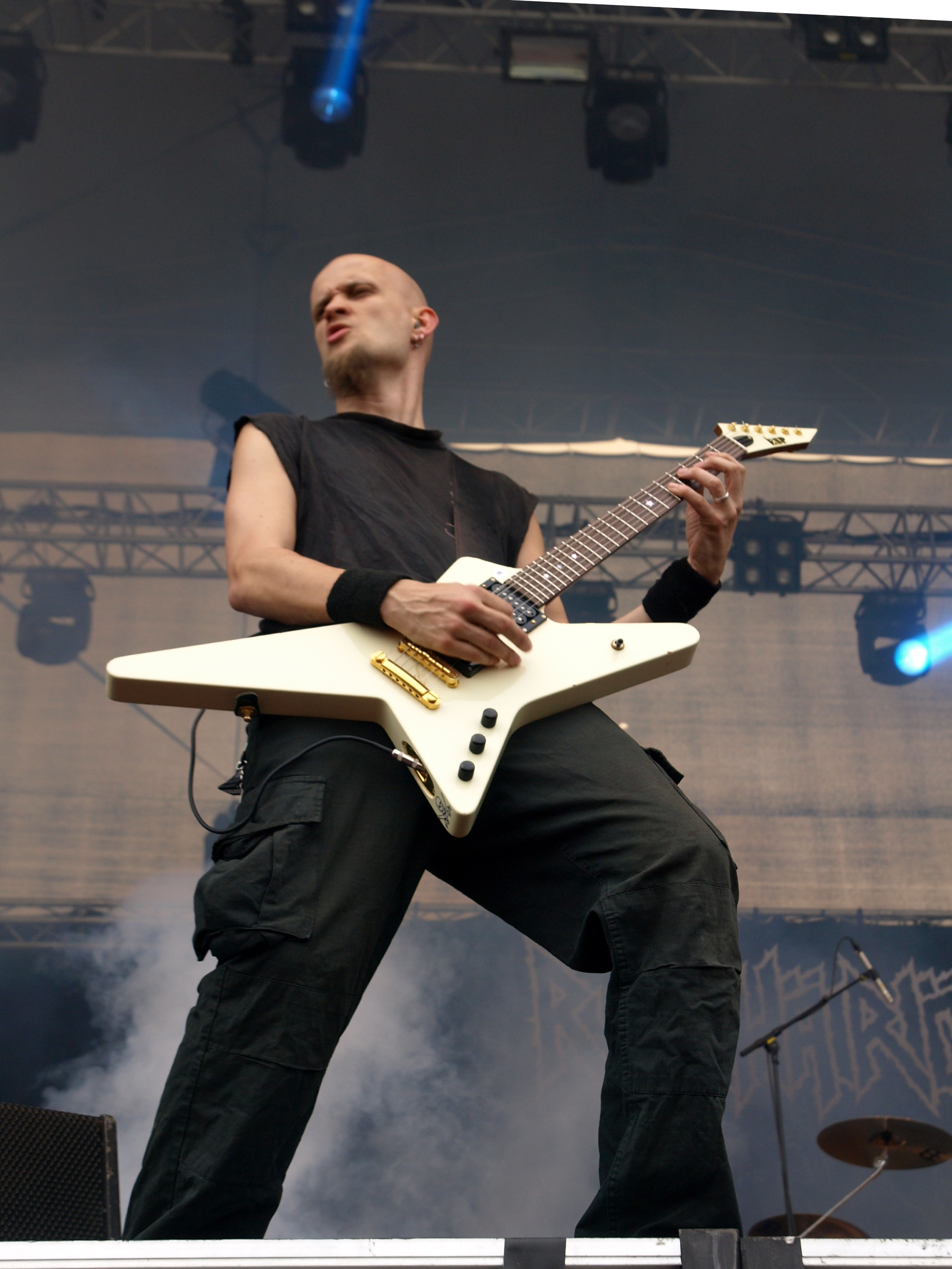 Rytmihäiriö live am Myötätuulirock 2011